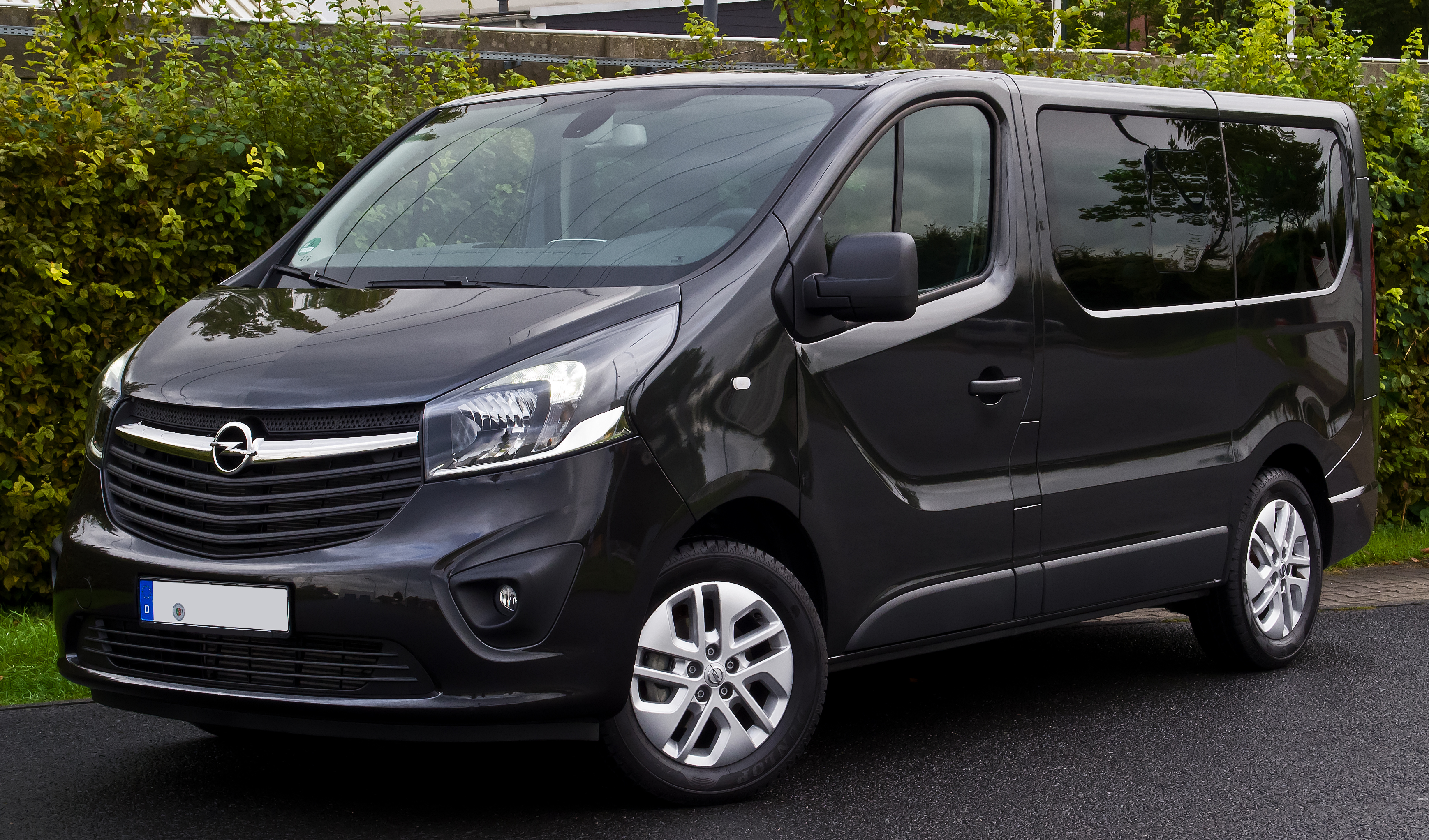 Opel Vivaro Combi 1.6 BiTurbo CDTI ecoFLEX (B)